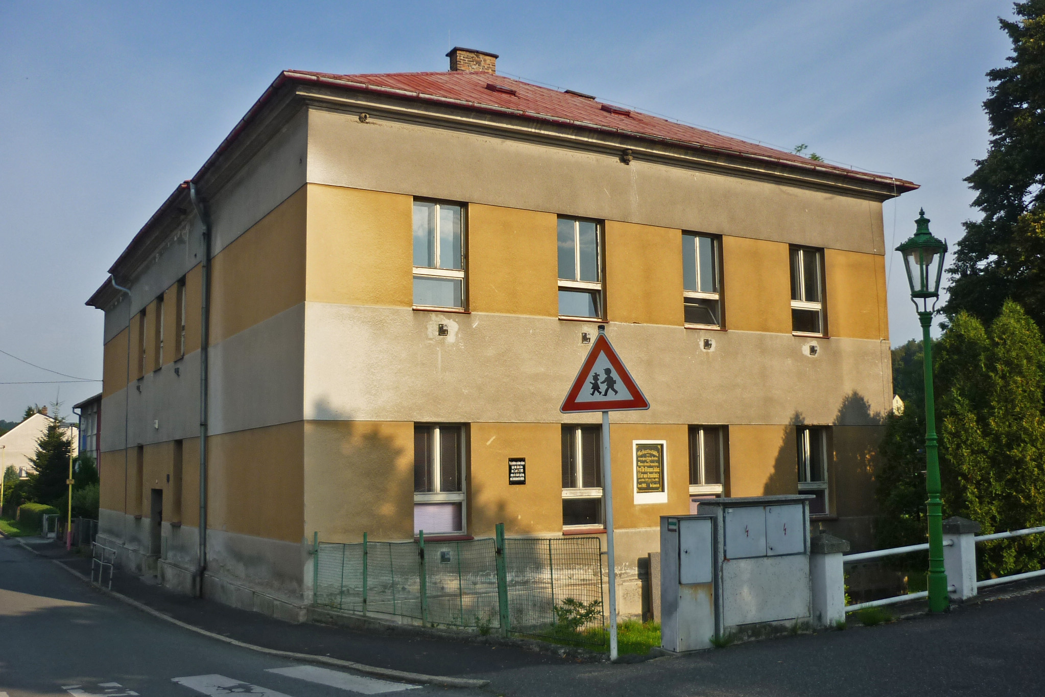 Náměstí Odboje čp. 6, budova bývalé školy, nyní knihovna, z let 1889–1890. Na budově je umístěna pamětní deska, že se v budově tehdejší školy na tomto místě (jako syn řídícího učitele) narodil v roce 1782 budoucí univerzitní profesor Dr. Vincenc Julius Krombholz, pozdější věhlasný lékař a rektor pražské univerzity, povýšený za svoje zásluhy do šlechtického stavu.